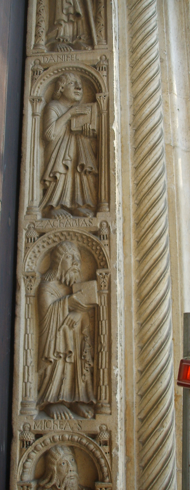 duomo di modena